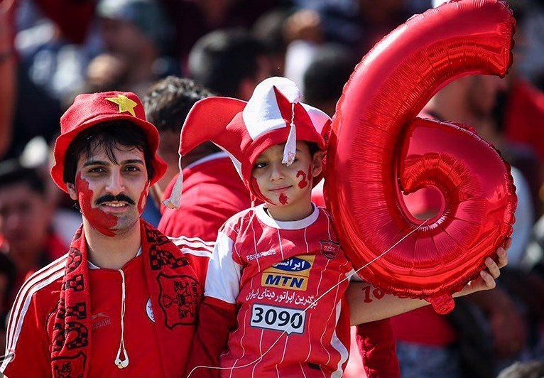 تصاویر تسنیم از شهرآورد هشتاد و ششم تهران